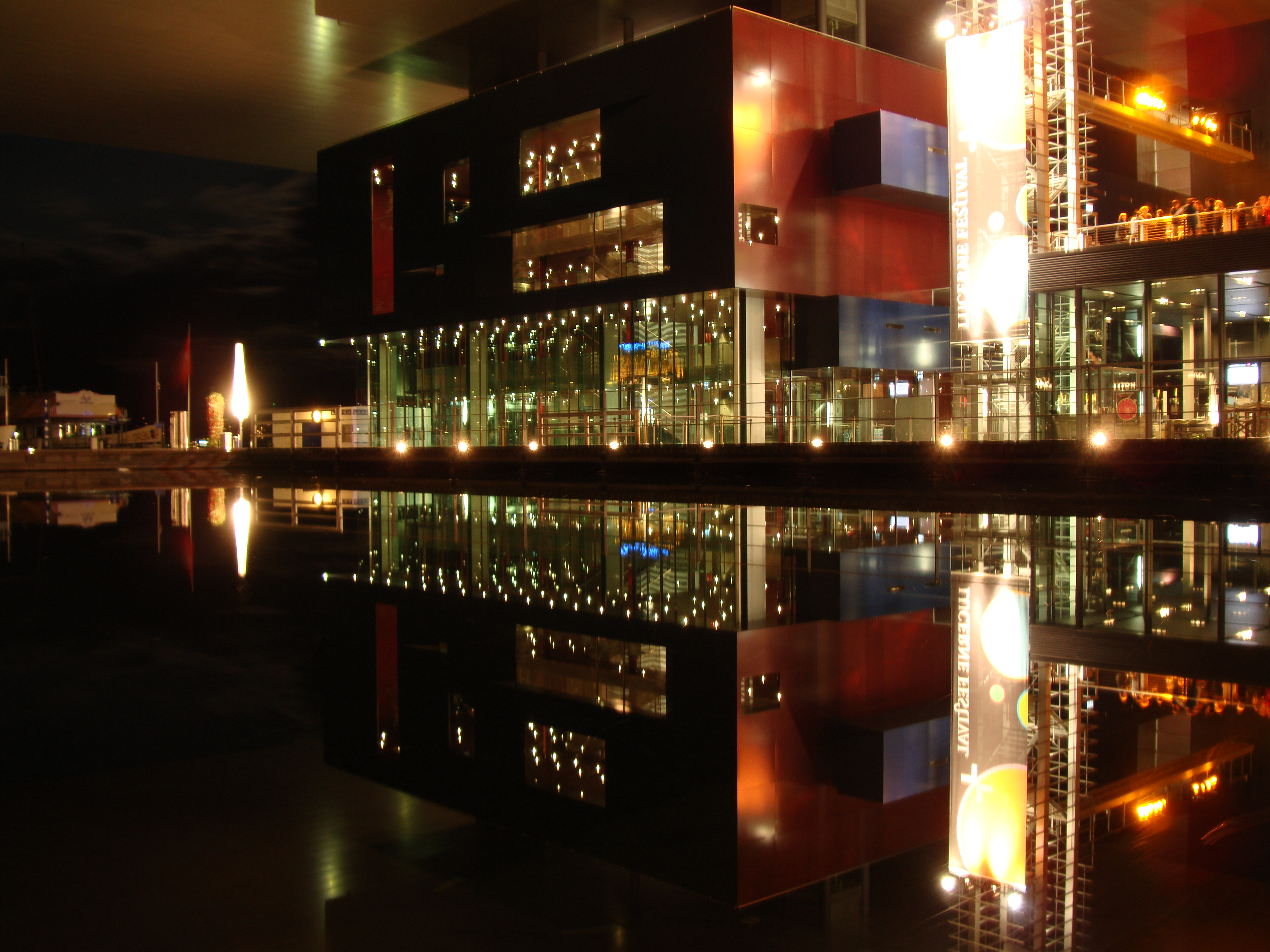 KKL in Lucerne